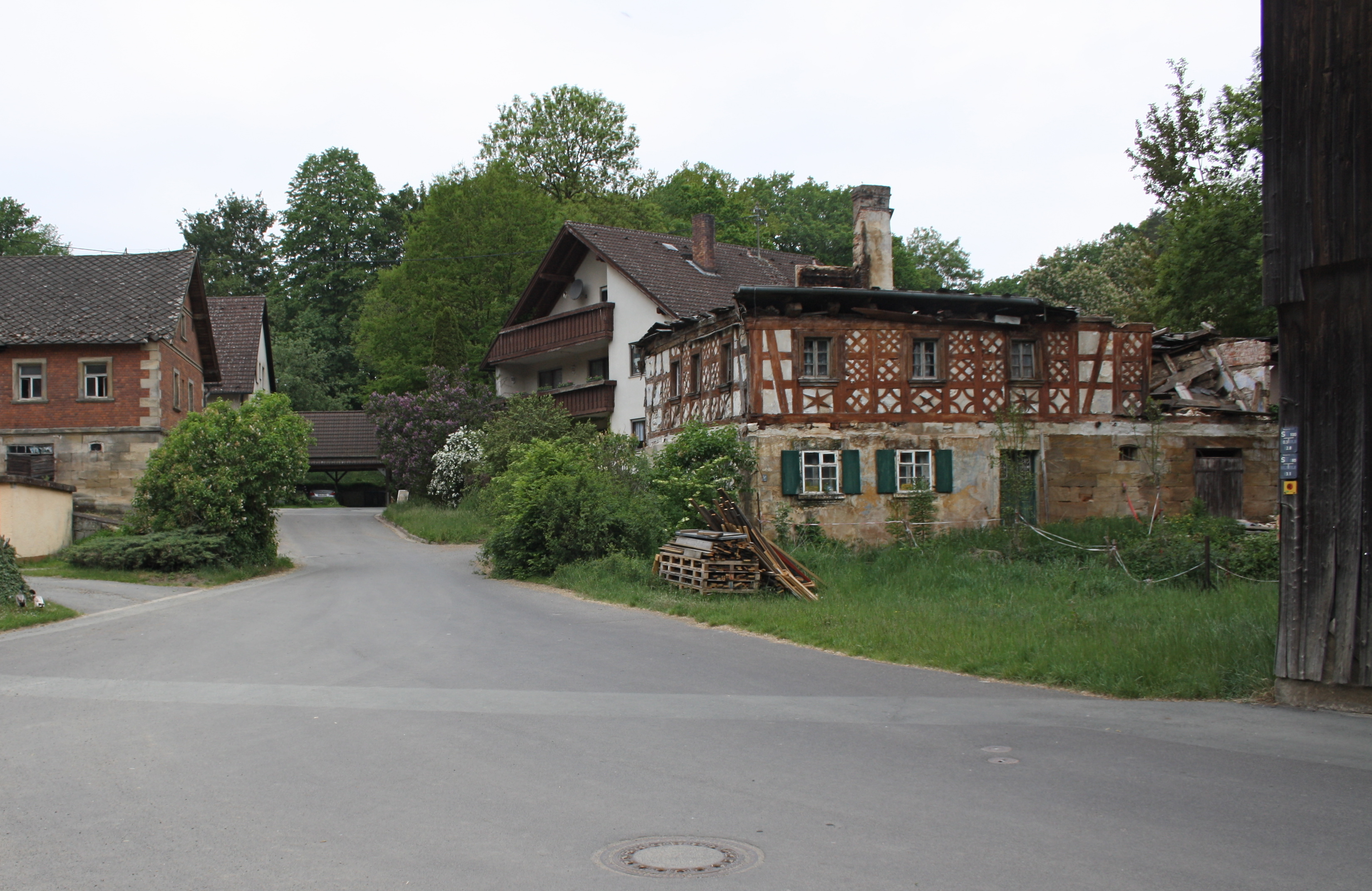 Bayreuth–Rödensdorf mit denkmalgeschütztem Wohnstallhaus Rödensdorf 28